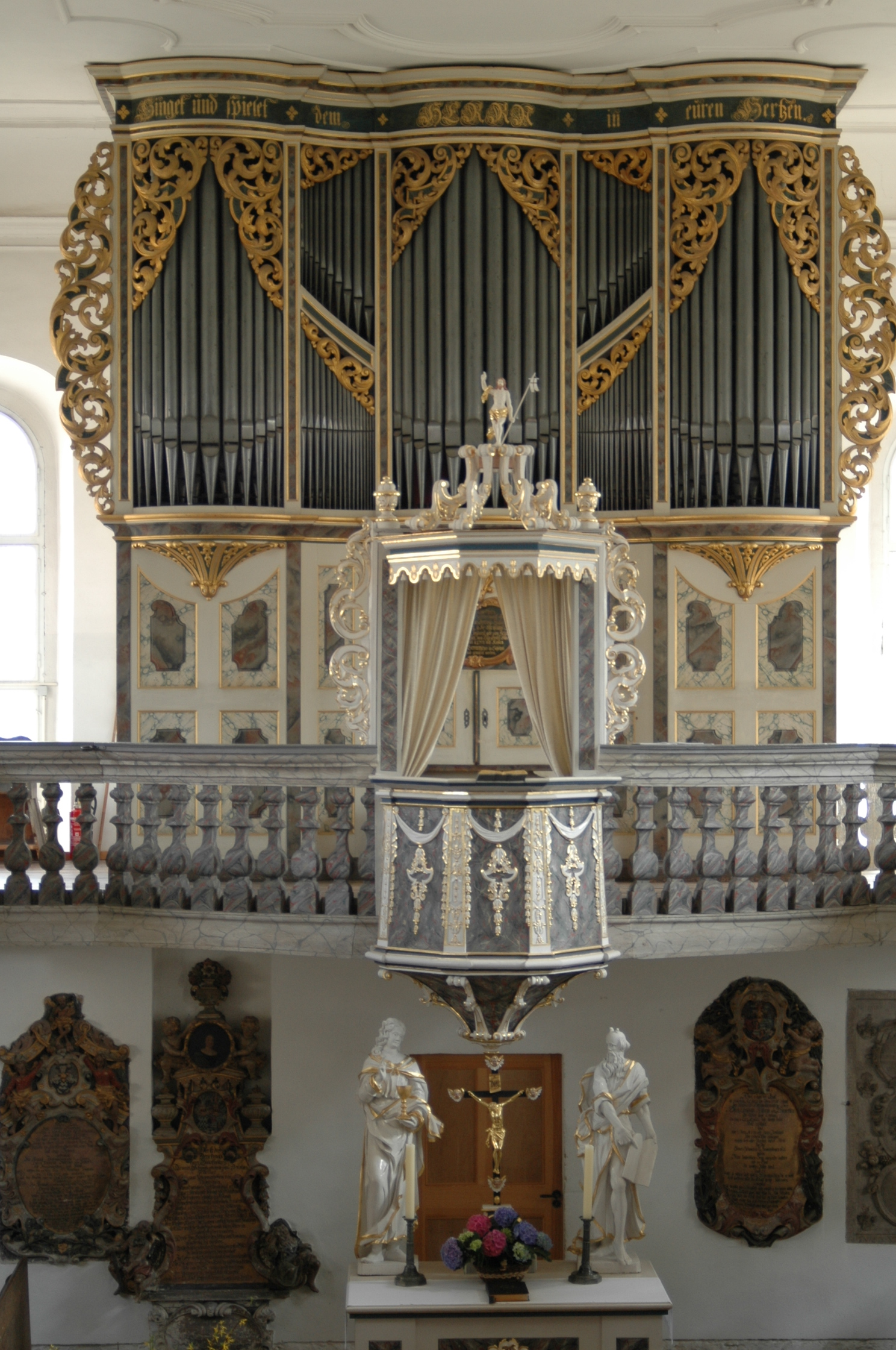 Gottfried-Silbermann-Orgel der Friedenskirche Ponitz in Thüringen, Deutschland